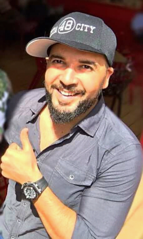 الدوزي